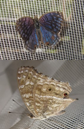 Junonia erigone (Cramer)